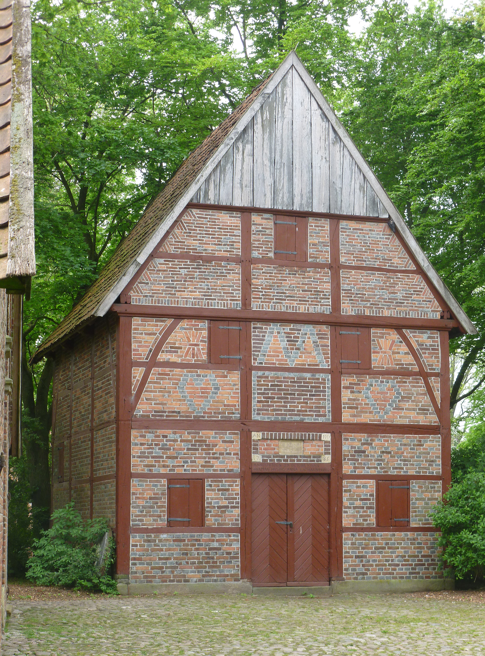 Fachwerkspeicher im Bauernhausmuseum in Vreden, Butenwall 11 This is a photograph of an architectural monument.